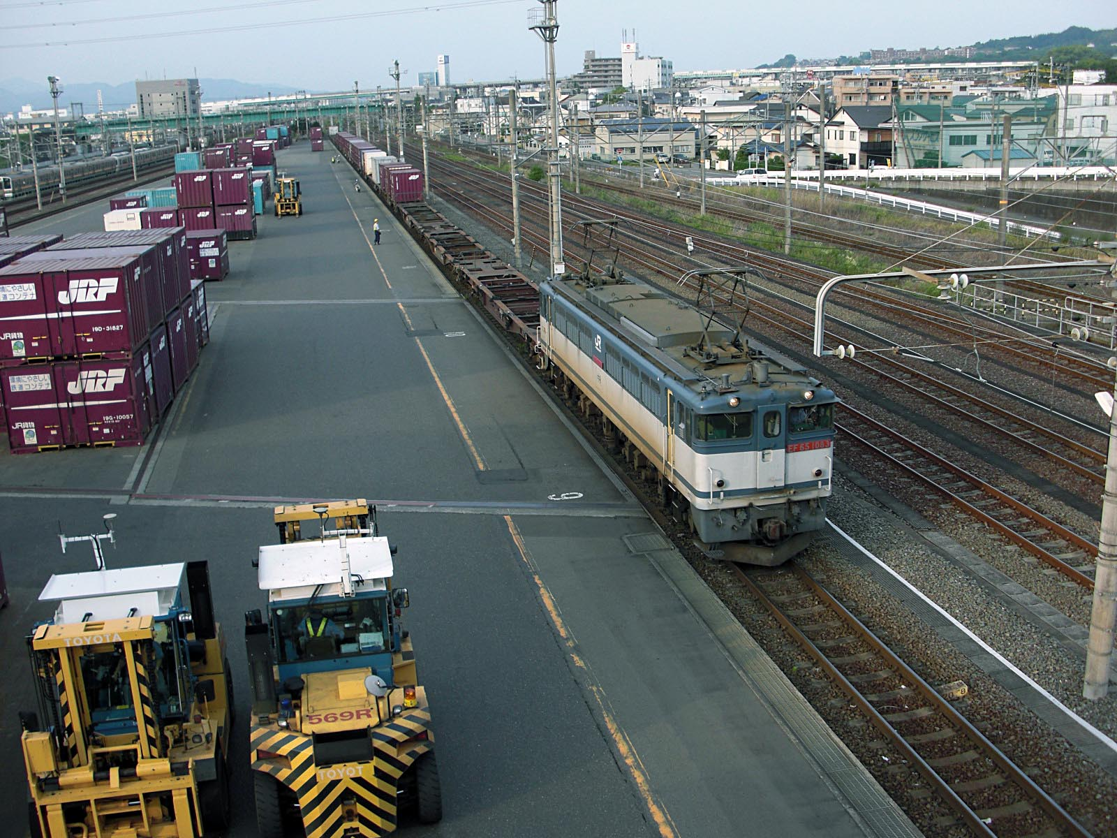 静岡市駿河区池田、JR貨物 静岡貨物駅。下り着発荷役線に入線する貨物列車（EF65 1083牽引）。